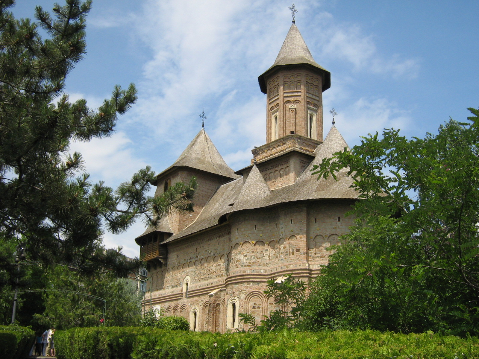 Biserica Fortificata Precista Galati 01